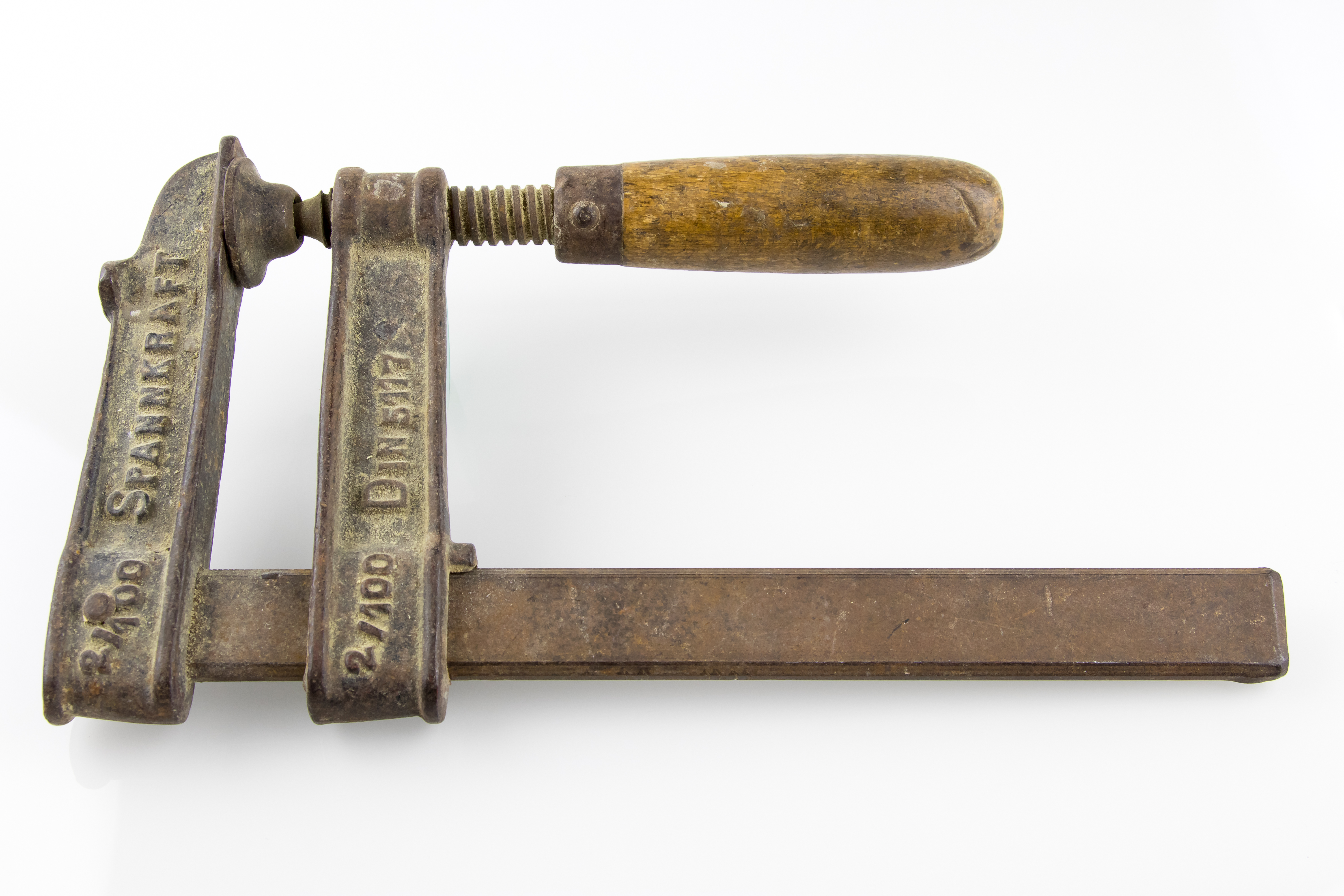 alte Schraubzwinge